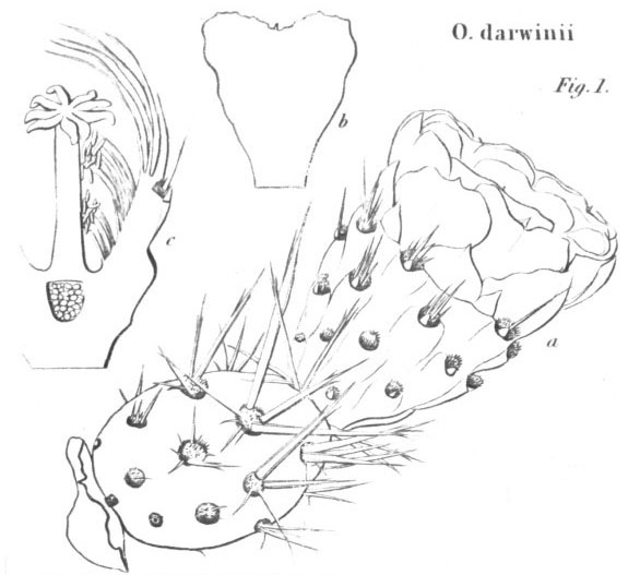 Tafel mit Abb. 1 zur Erstbeschreibung von Opuntia darwinii in Magazine of Zoology and Botany. Band 1, 1837